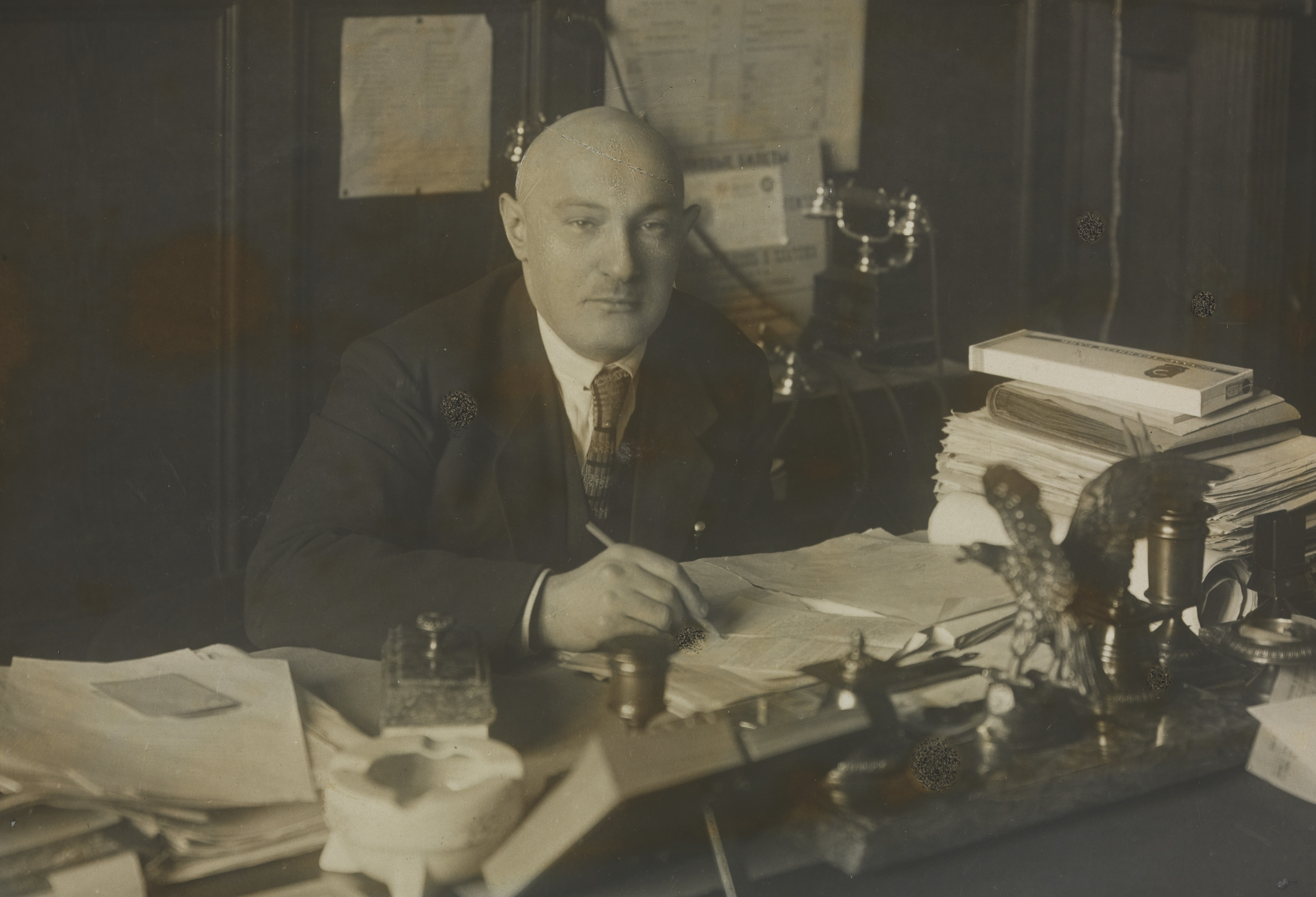 Scheinman, president for Statsbanken i Sovjetunionen. Depicted person: Aron Scheinman Depicted place: Russia Шейнман, Арон Львович